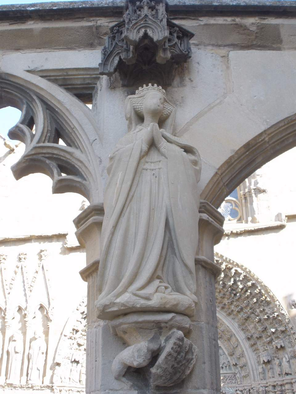 Atrio de la Iglesia de Santa María la Real de Olite (Navarra)